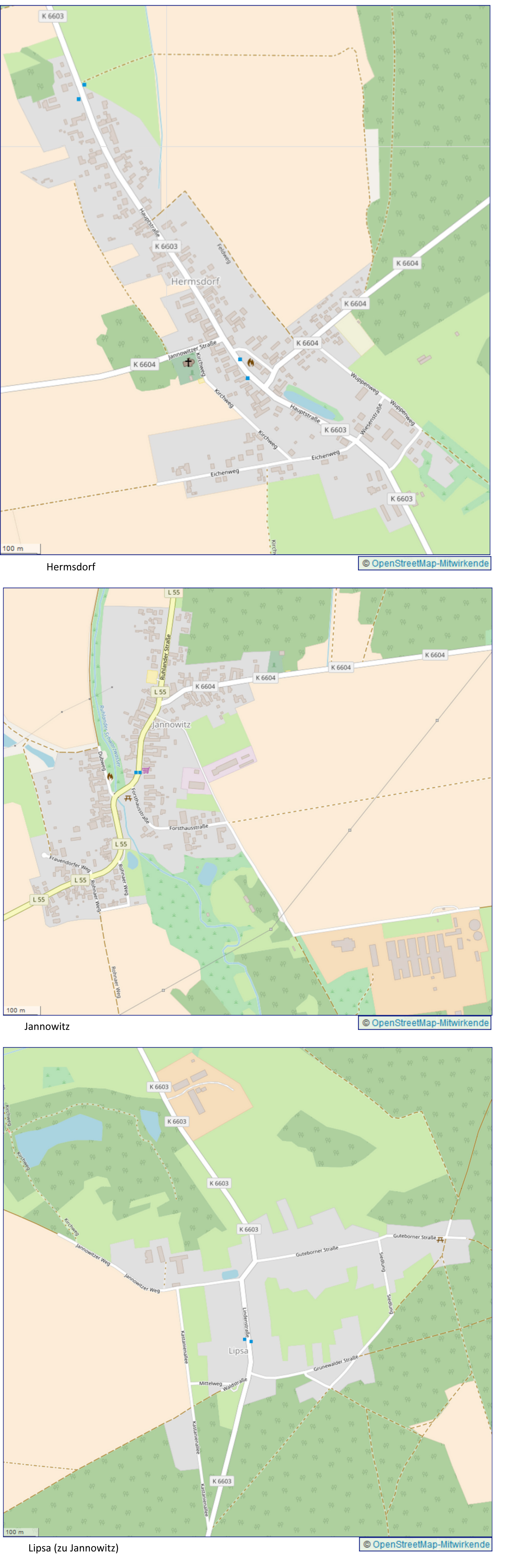 Übersichtsplan Straßen in Hermsdorf mit Ortsteil Jannowitz und Gemeindeteil Lipsa aus OpenStreetMap